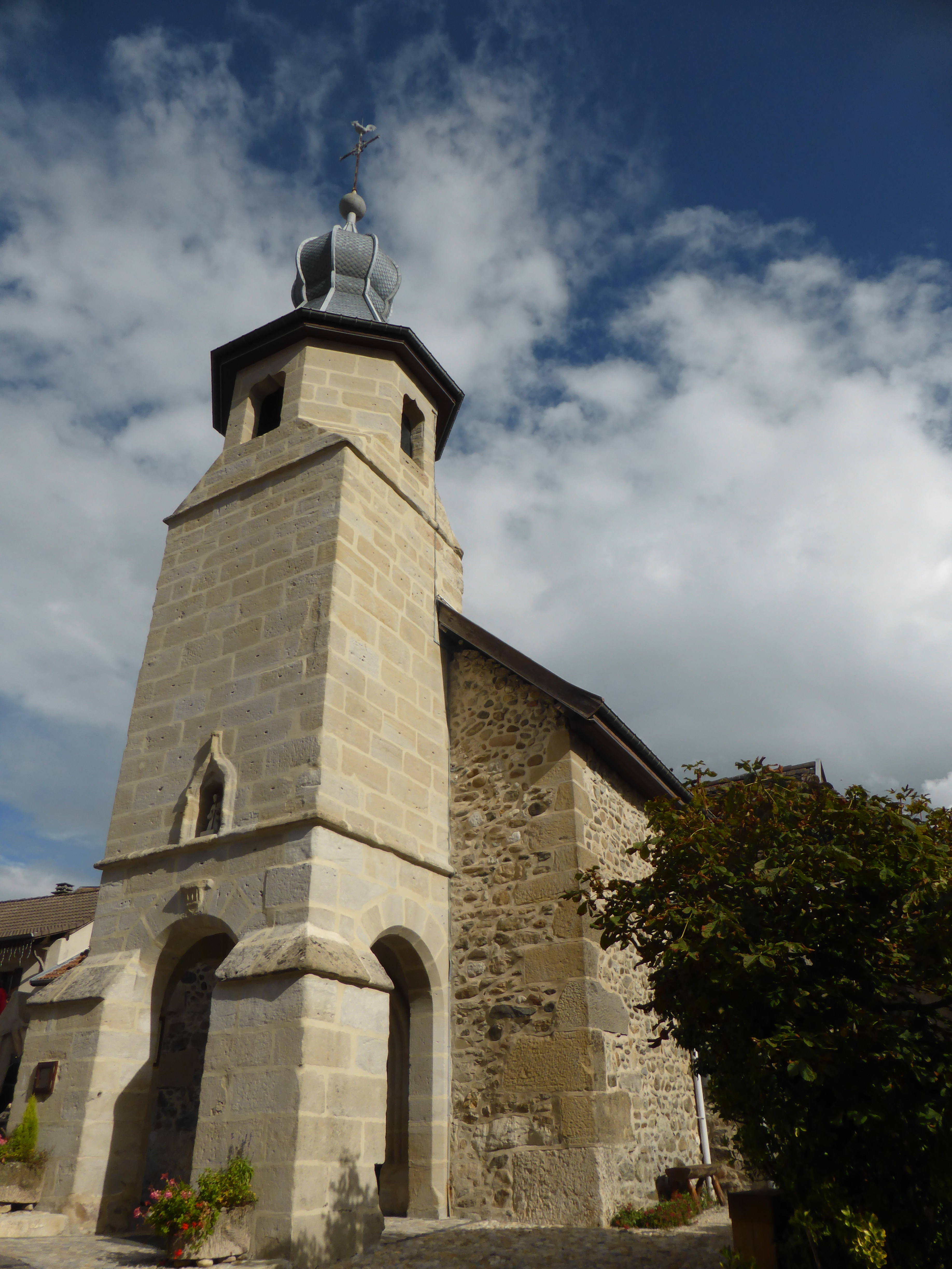 Chapelle de Charly à Andilly, en Haute-Savoie.